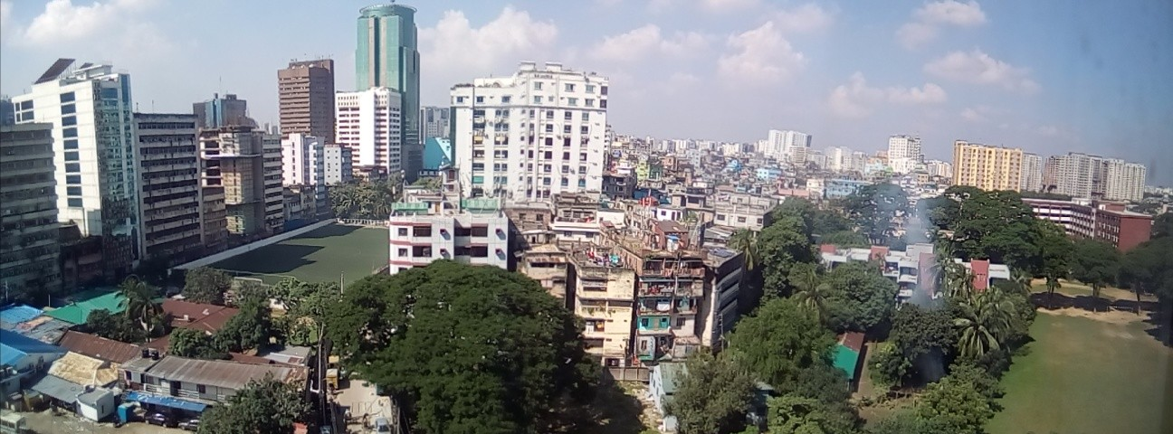 মতিঝিল,ঢাকা